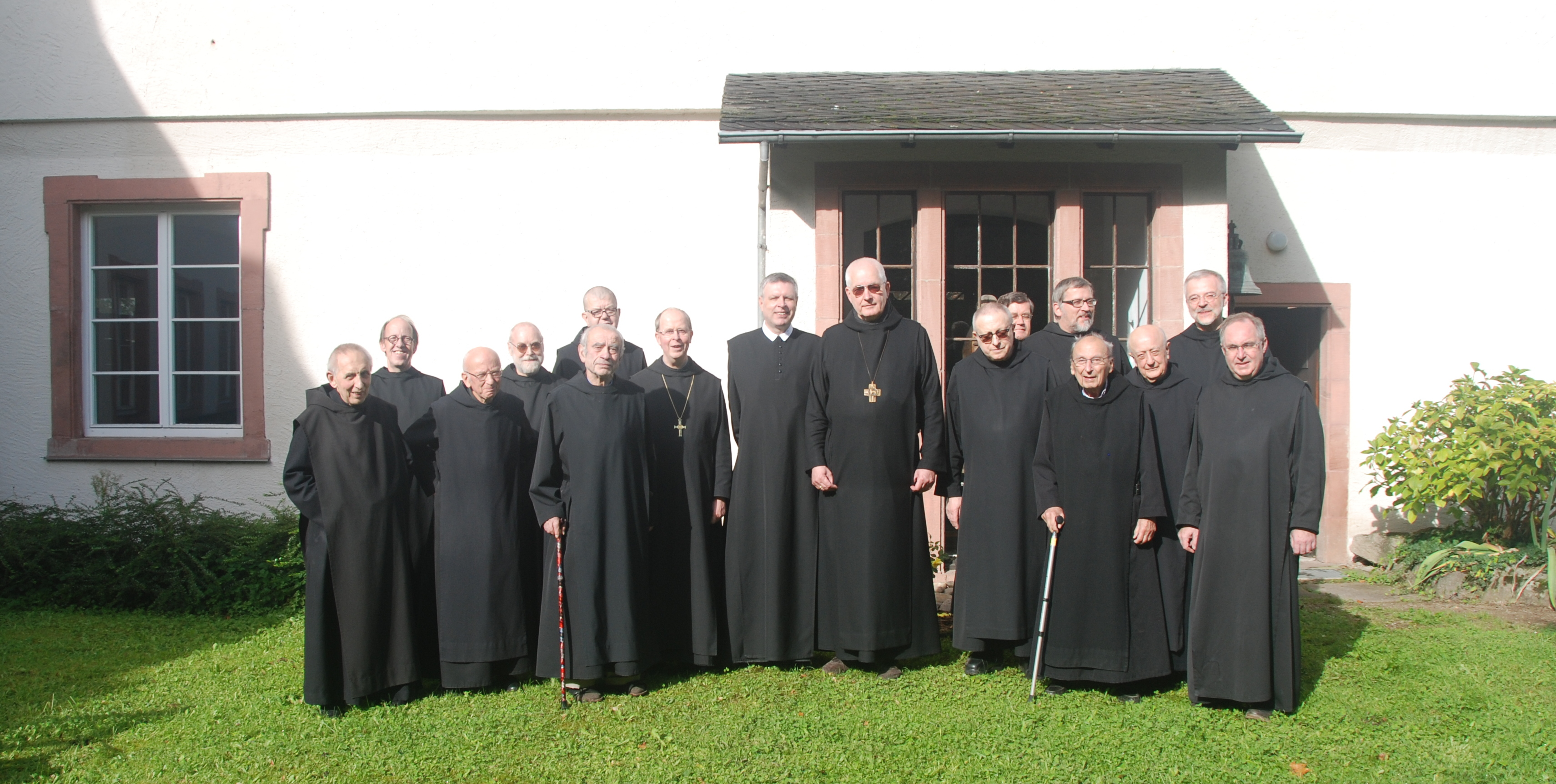 Winfried Schwab OSB nach seiner Abtswahl im Kreise seiner Mitbrüder